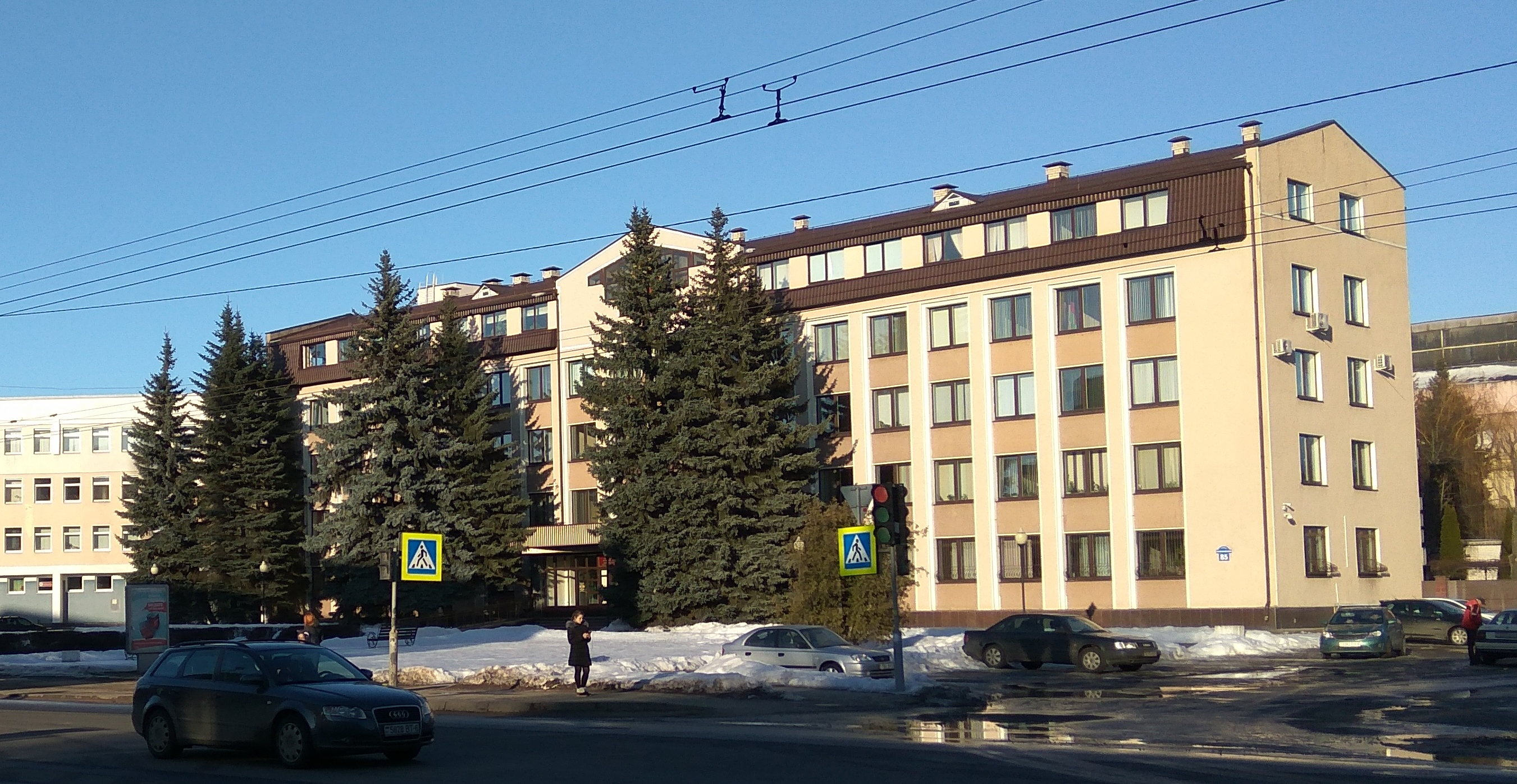 Магілёў. Першамайская вуліца (вясна 2018)